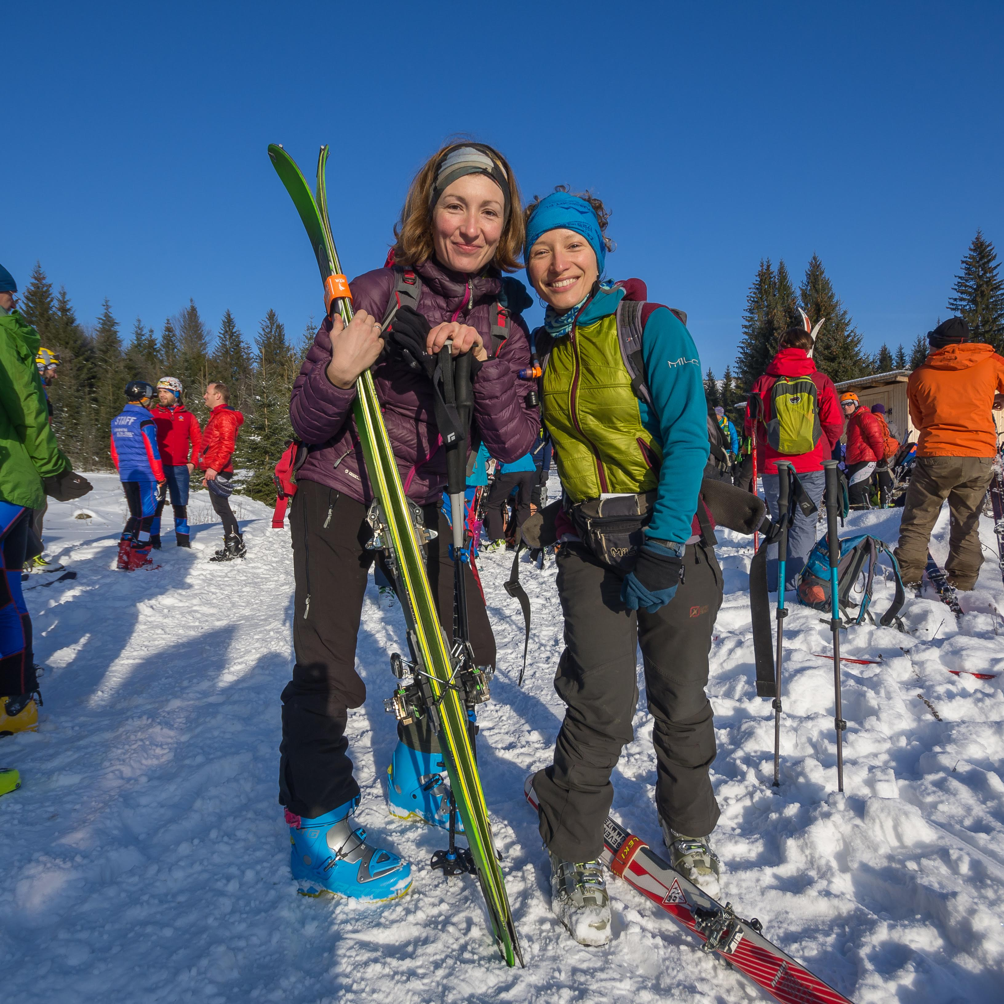 Жіноча команда на Кубку Білого Слона 2018 в Українських Карпатах